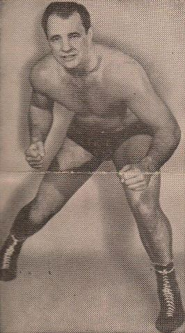 Vern Gagne en une du journal de catch Sports Facts du 22 septembre 1952.